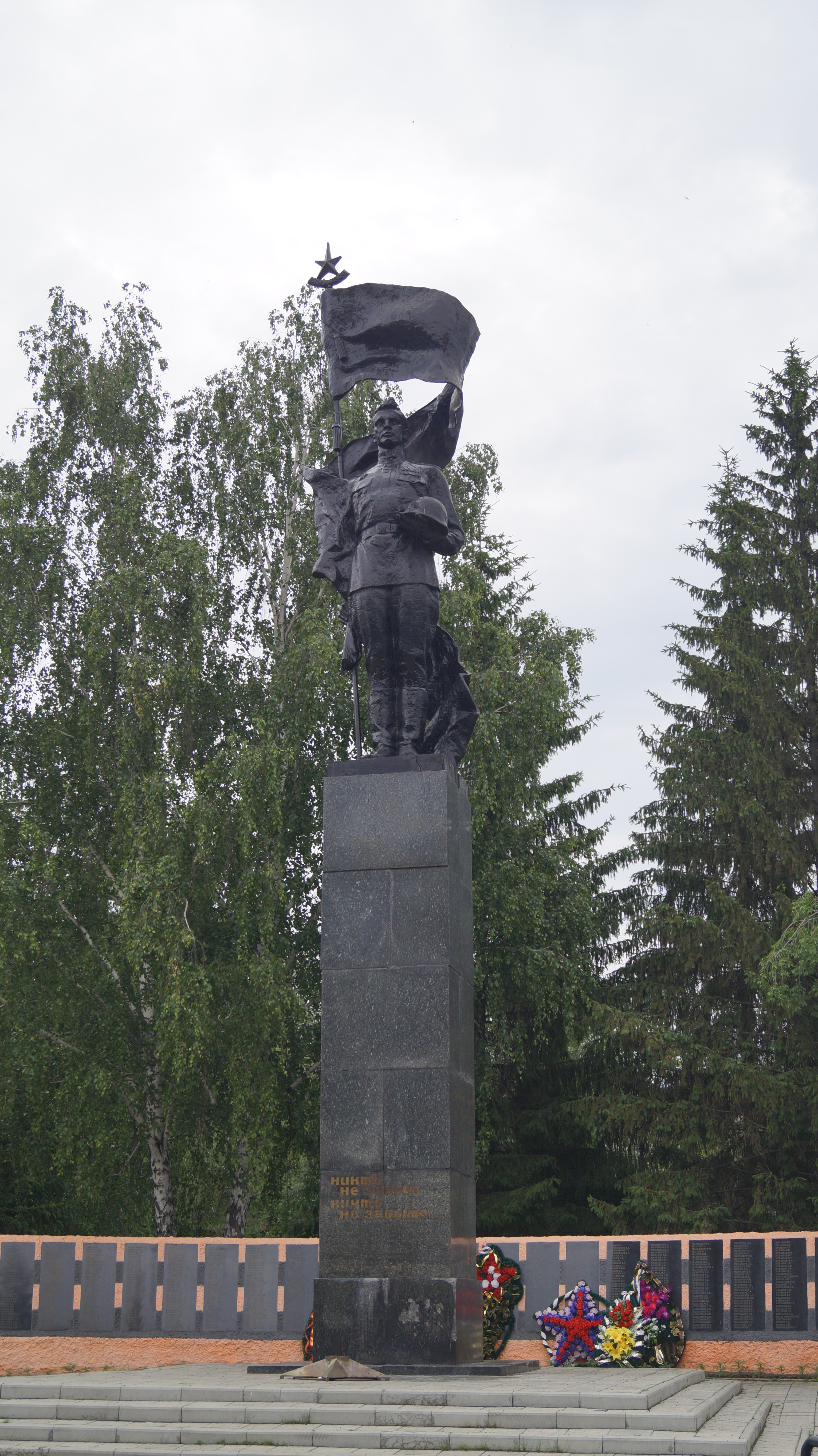 Памятник войну-освободителю в Сквере Победы (город Чебаркуль)